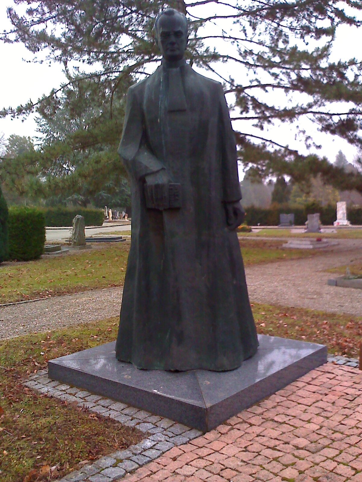 Statue à la mémoire de Aurel Constantin POPOVICI, dévoilée à Genève, le 19.06.1977, par S.A.R.I. Otto de Habsbourg, Président de l'Union PanEuropéenne.